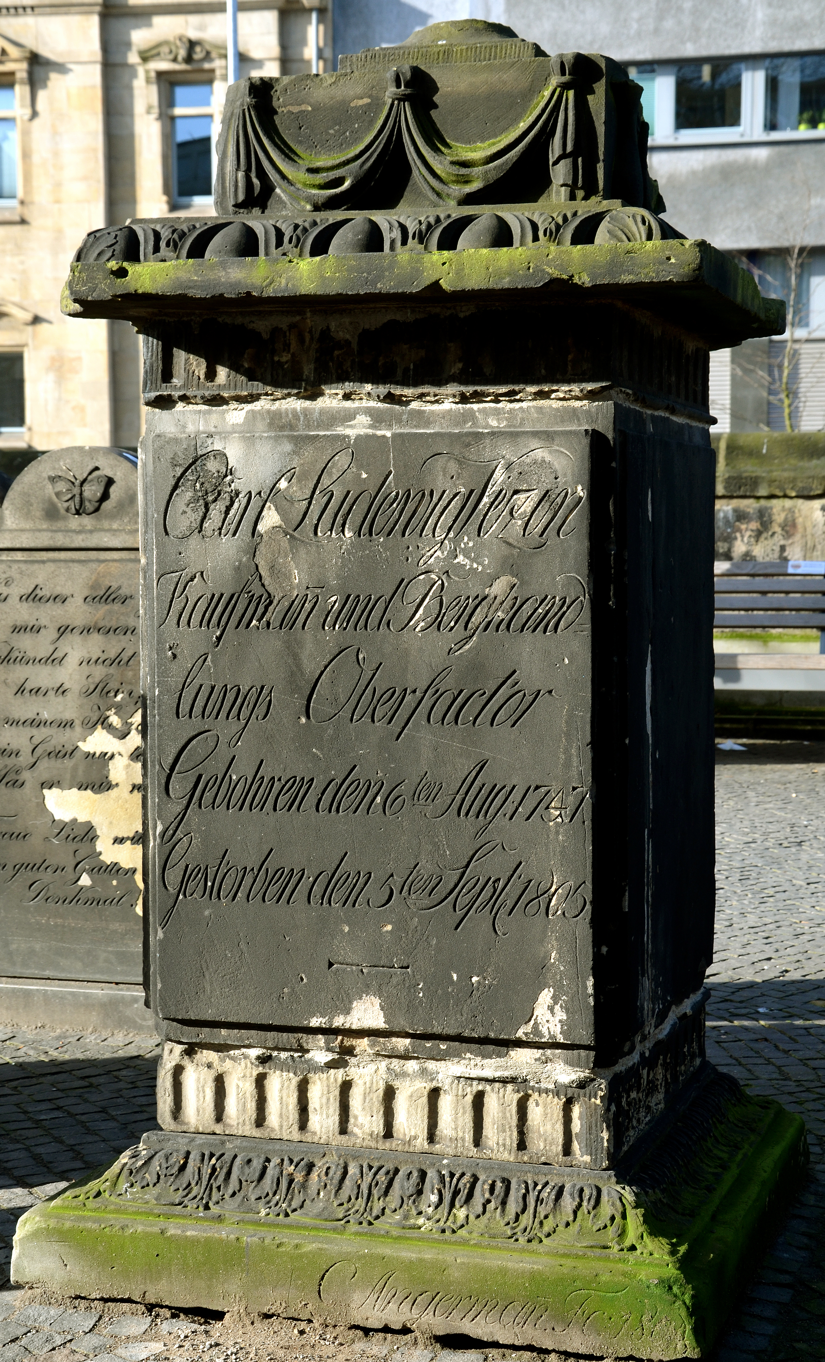 Der - denkmalgeschützte - Grabstein des Kaufmanns und Berghandlungs-Oberfaktors Carl Ludewig Vezin (6. August 1747 - 5. September 1805) wurde im Zuge der Umgestaltung des Platzes an der Goseriede und dem Alter St.-Nikolai-Friedhof in Hannover als Teil einer neu zusammengestellten Denkmal-Gruppe südlich der Nikolaikapelle versetzt. Am Fuß des Grabmals findet sich der Hinweis auf den Bildhauer „C. Angerman, 1808“ ...